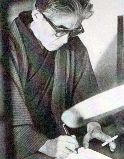 朝日新聞社『朝日ジャーナル』第6巻第7号（1964）より和田芳恵